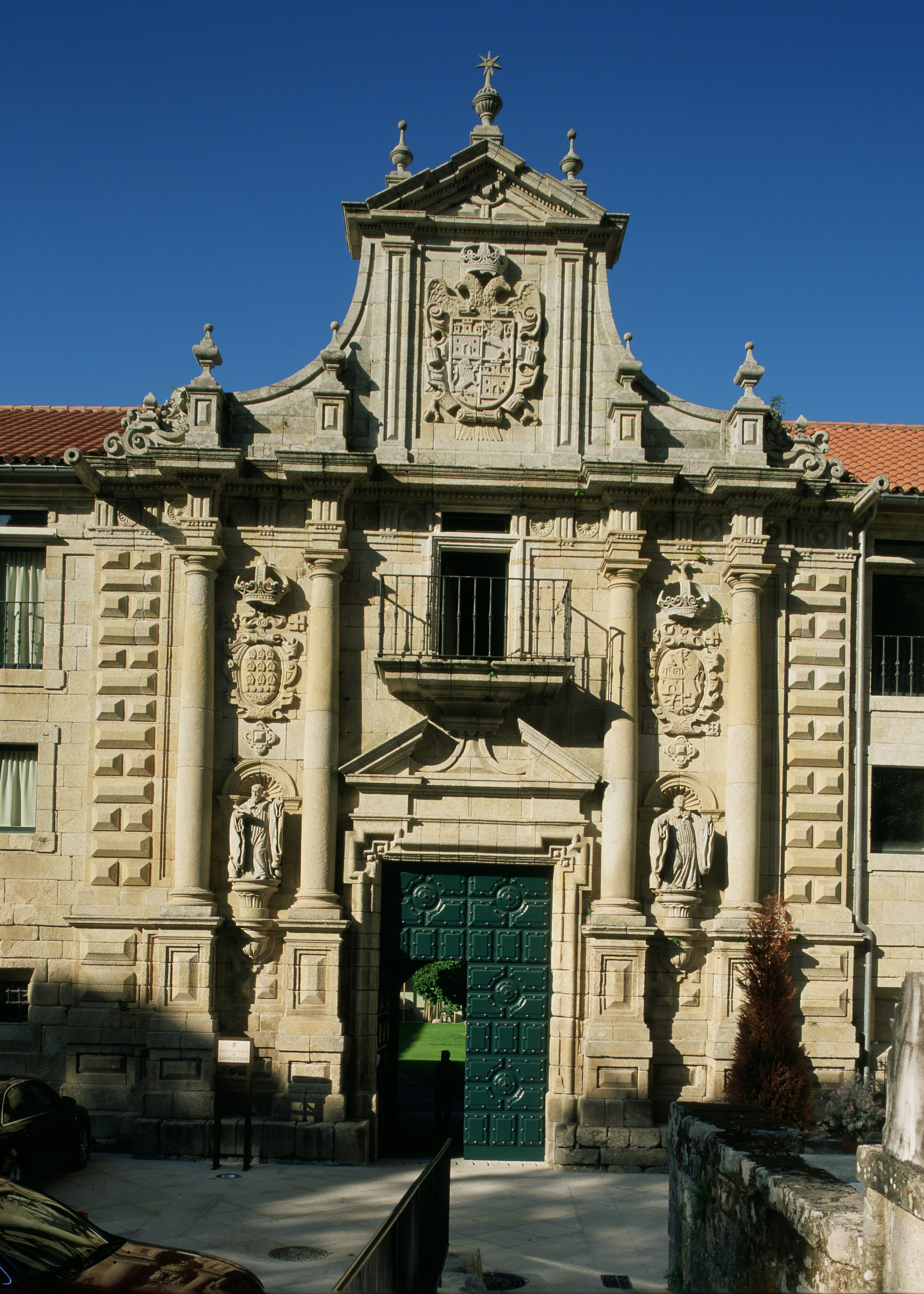 Parador de Santo Estevo